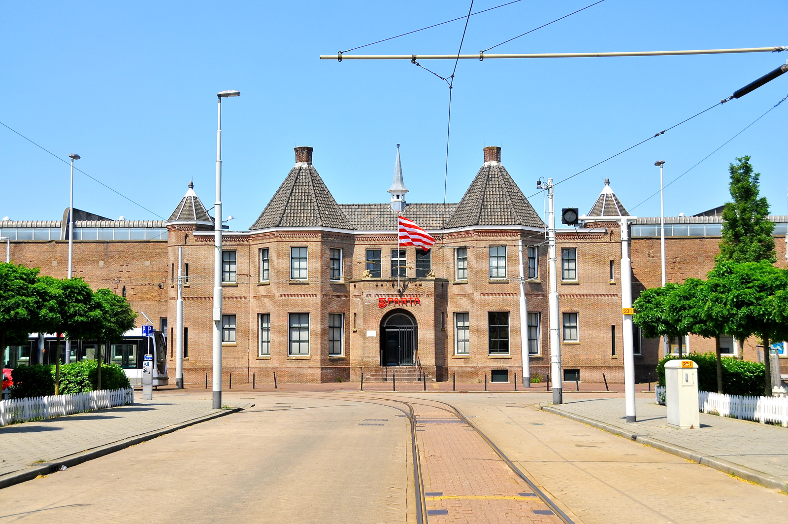 Rotterdam, Spangen. Spartastadion. Rijksmonument.